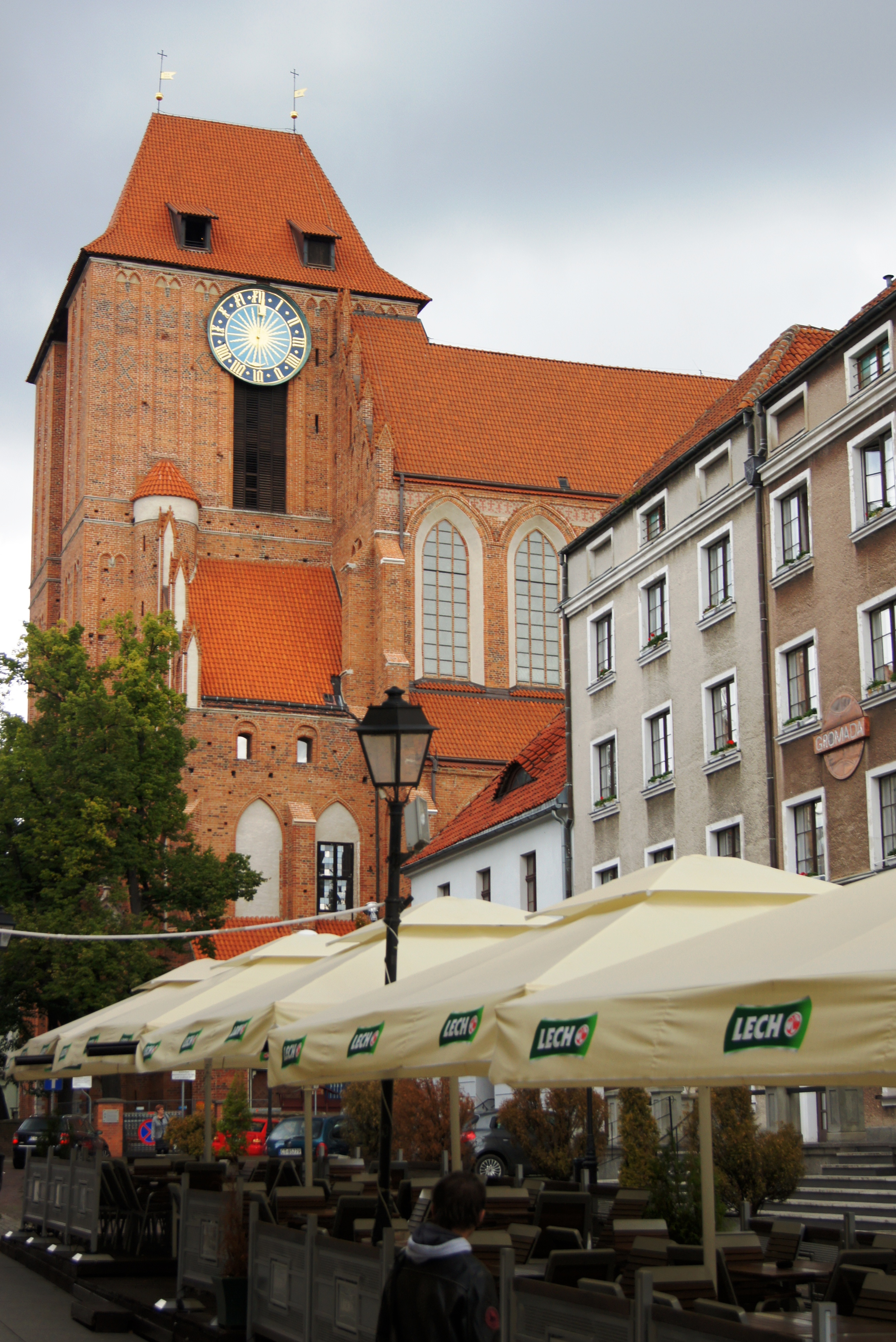 Toruń - kościół par., ob. katedra p.w. śś. Jana Chrzciciela i Jana Ewangelisty